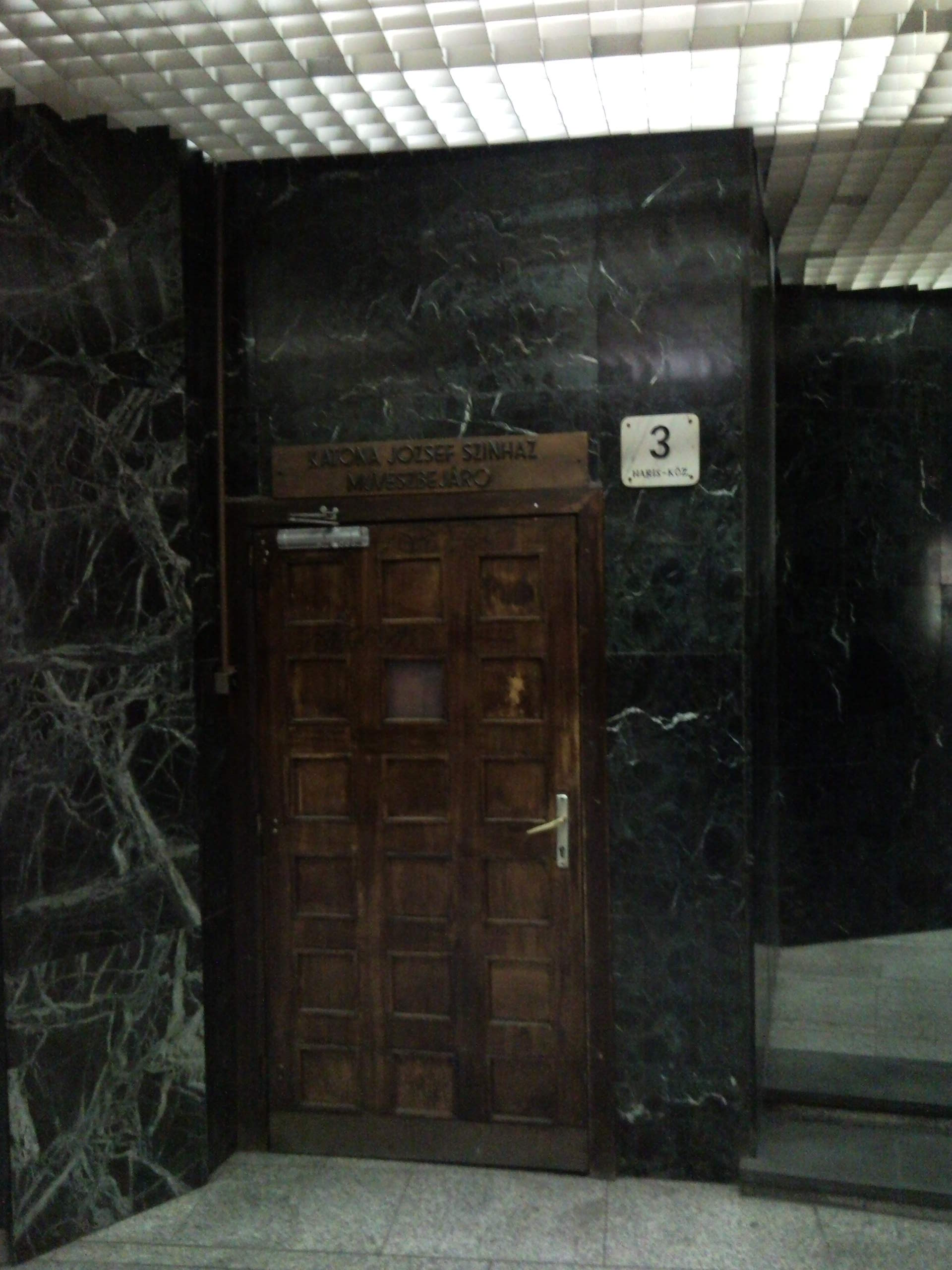 Katona József Színház művészbejáró a Párizsi udvarban